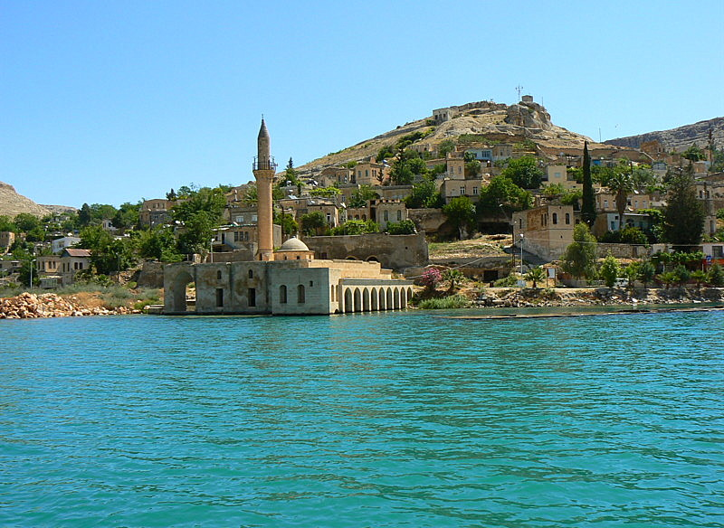 halfeti